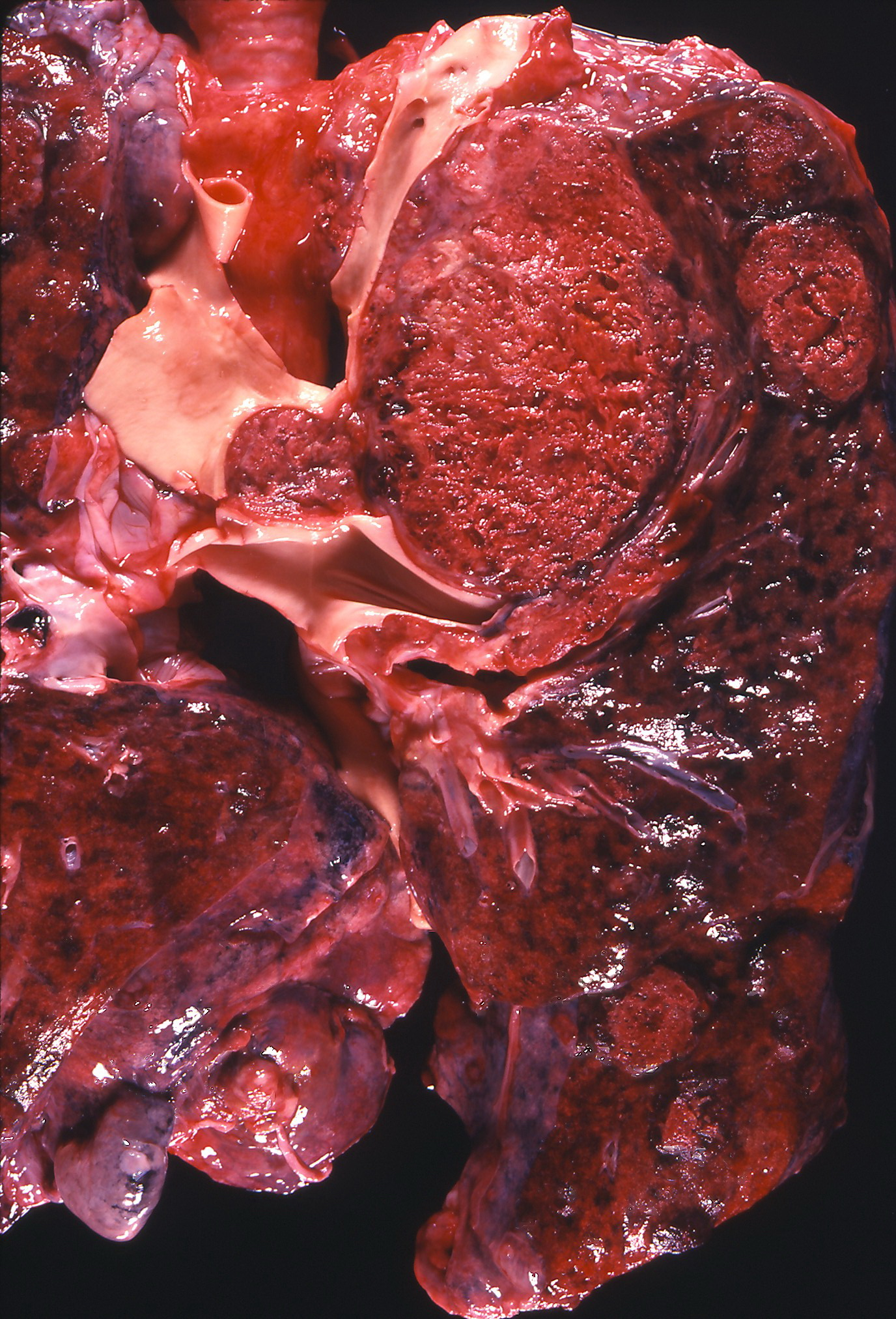 Metastatic choriocarcinoma